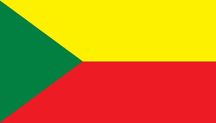 Bandera de Sigsig